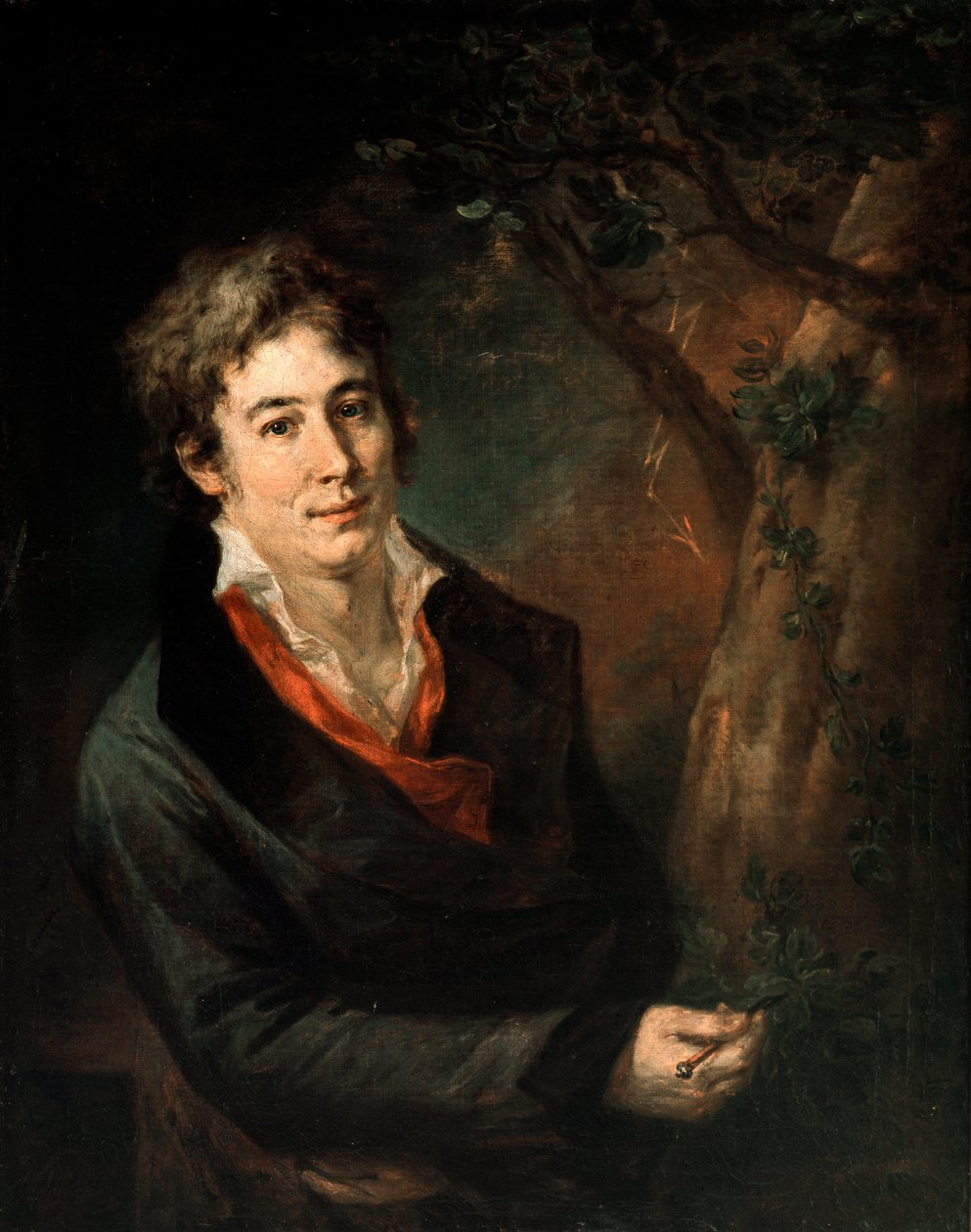 Ritratto di Ugo Foscolo, Italian poet.